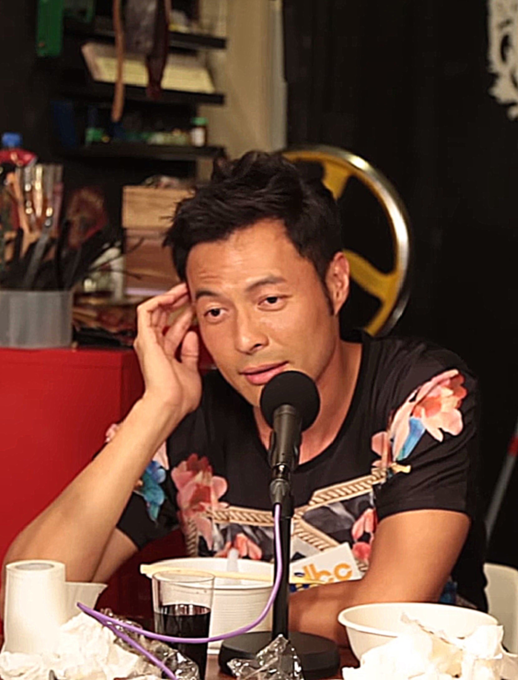 中文（香港）: 香港男演員，曾在無綫電視處境劇《愛·回家》裡，飾演查李施律師事務所律師「嚴謹」而為人認識